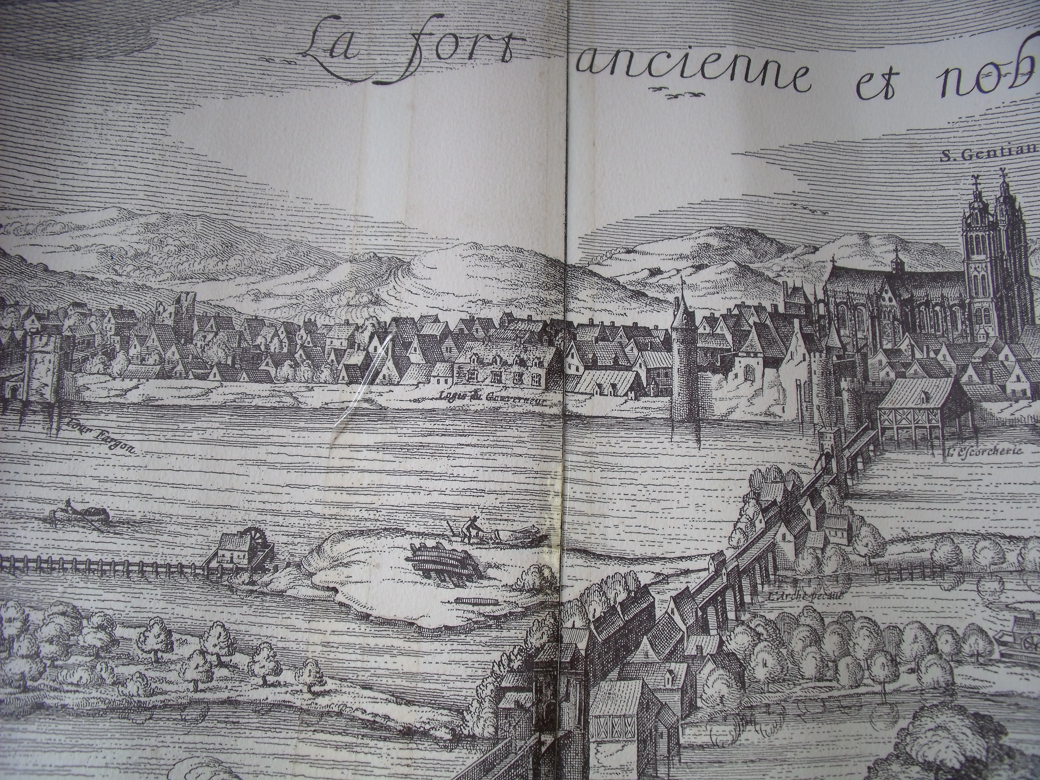 Quartier saint Gatien, extrait de l'estampe gravé par monsieur LAES JANSZ VISSCHER en 1625 tiré d'un original sur vélin de 2.35 m sur 41 cm, propriété de desprez37